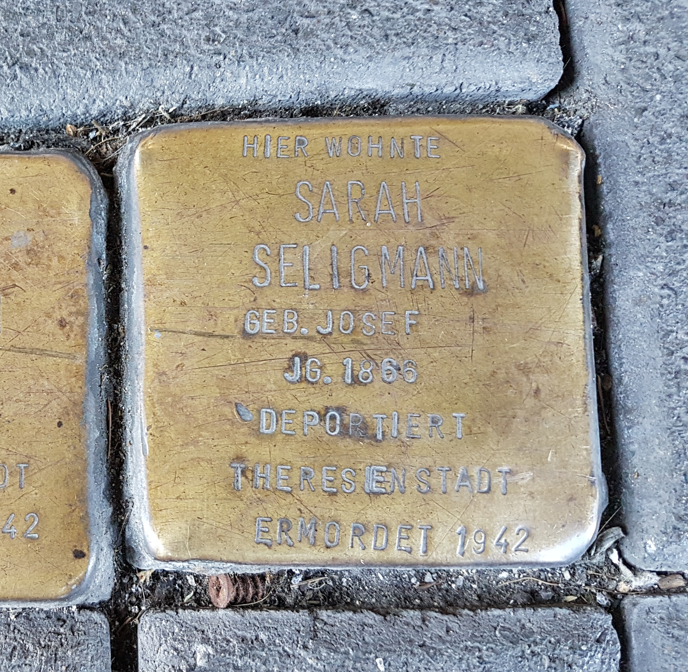 Sarah Seligmann Stolperstein Duisburg